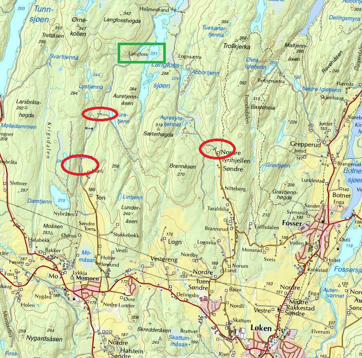 Kartutsnitt som viser Langfoss markert med grønn firkant og de mest vanlige utgangspunktene med parkeringsplass for bil med røde sirkler.